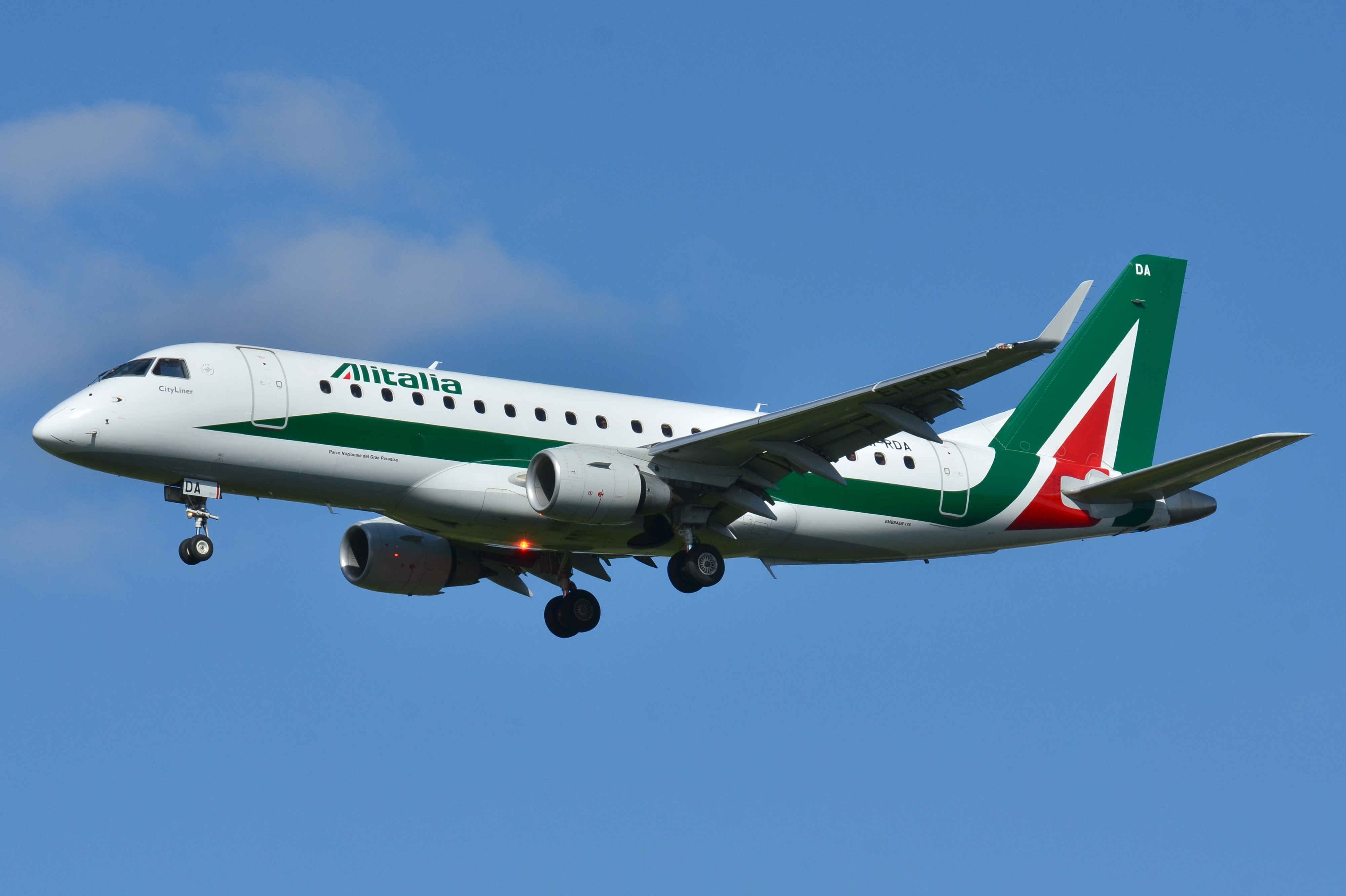 Photo prise à l'aéroport de Toulouse-Blagnac (LFBO) en France. Picture take at Toulouse-Blagnac Airport (LFBO) in France.